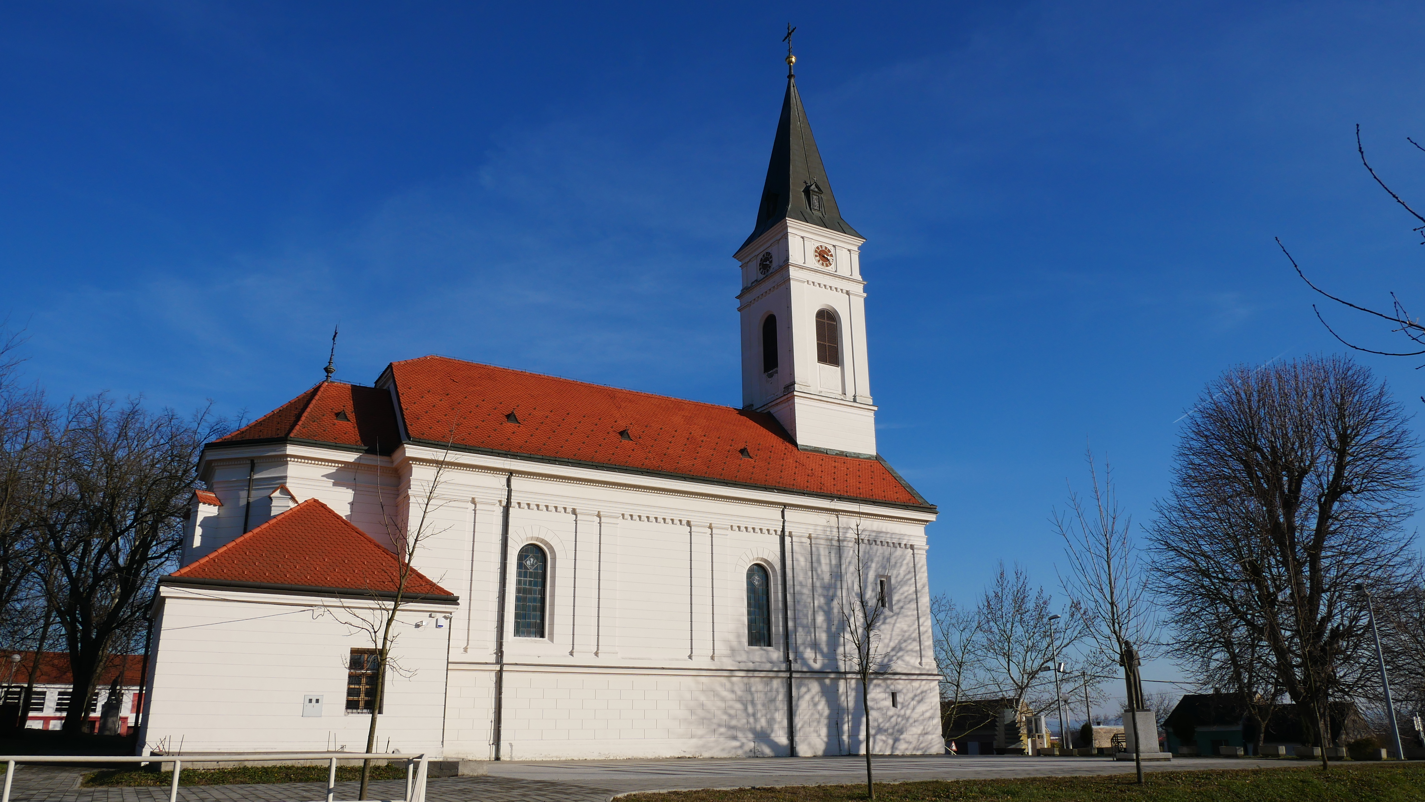 Crkva sv. Antuna Padovanskog u Podvinju